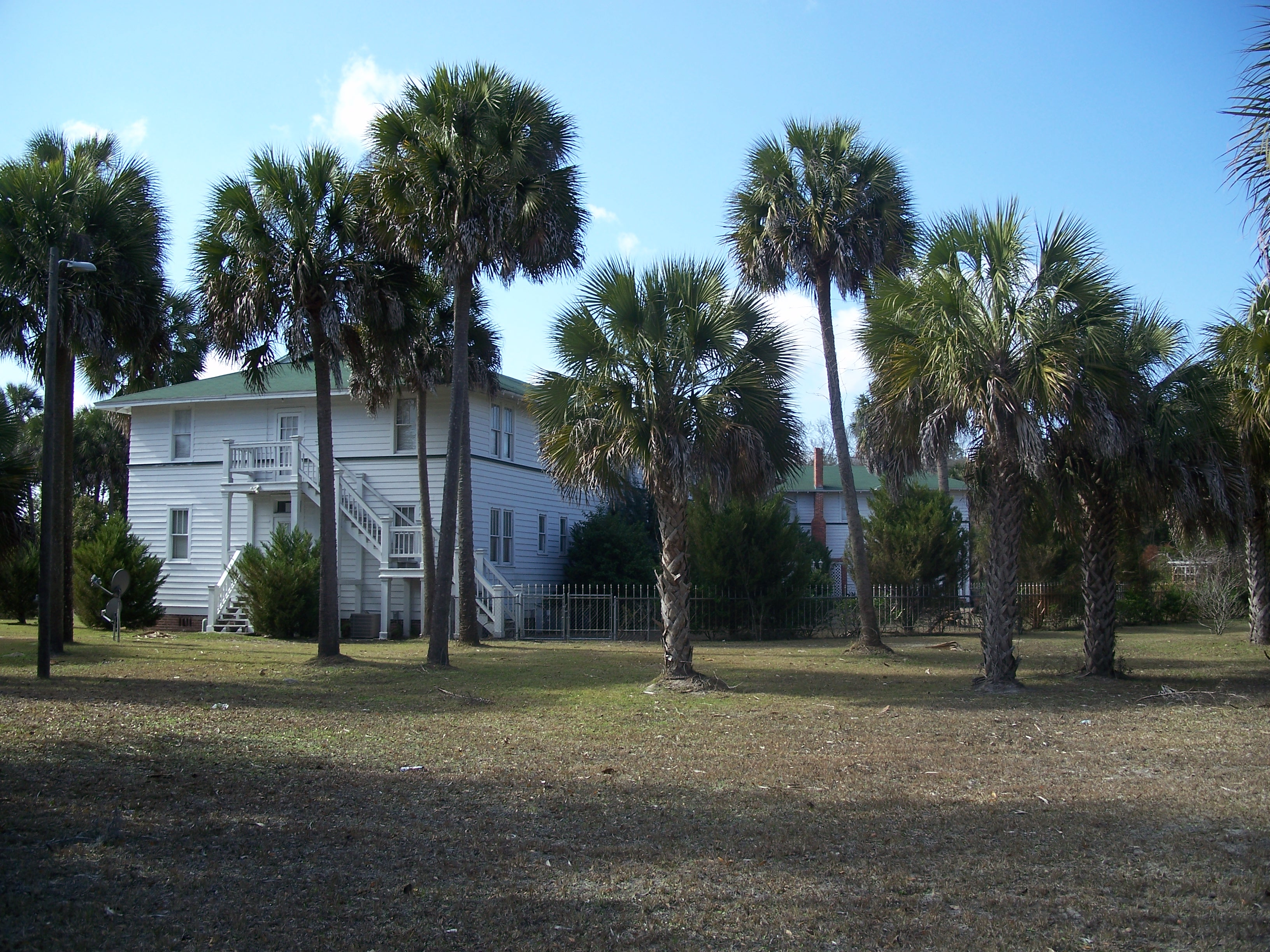 Shamrock, Florida: Putnam Lodge